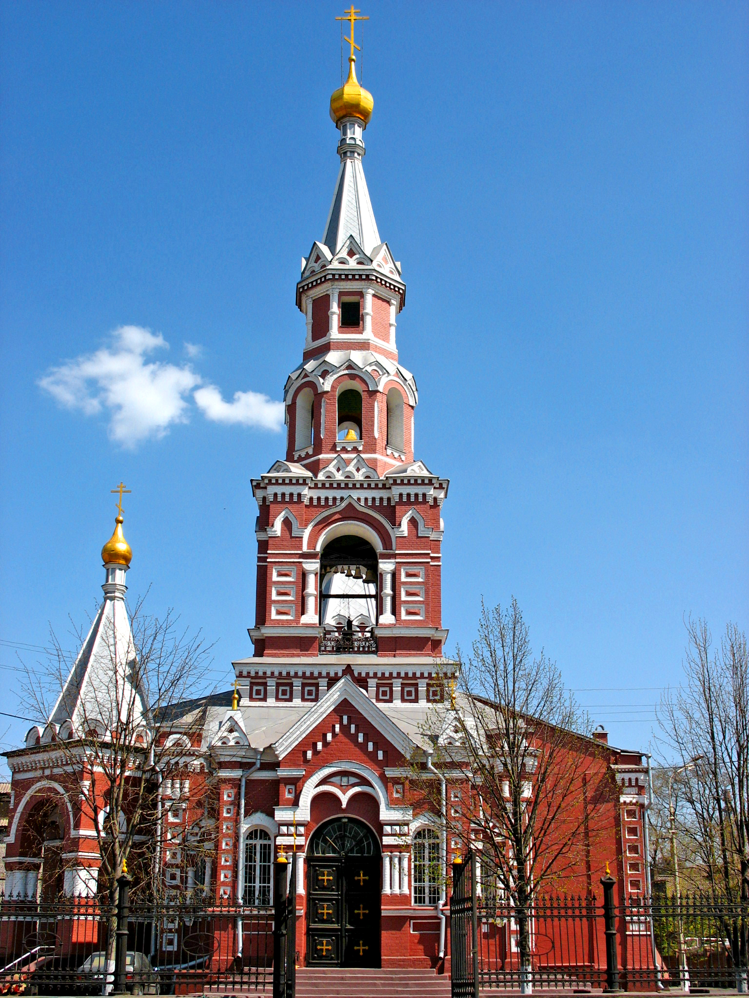 Миколаївський собор (мур.), Кам'янське, вул. Журавлина, 1